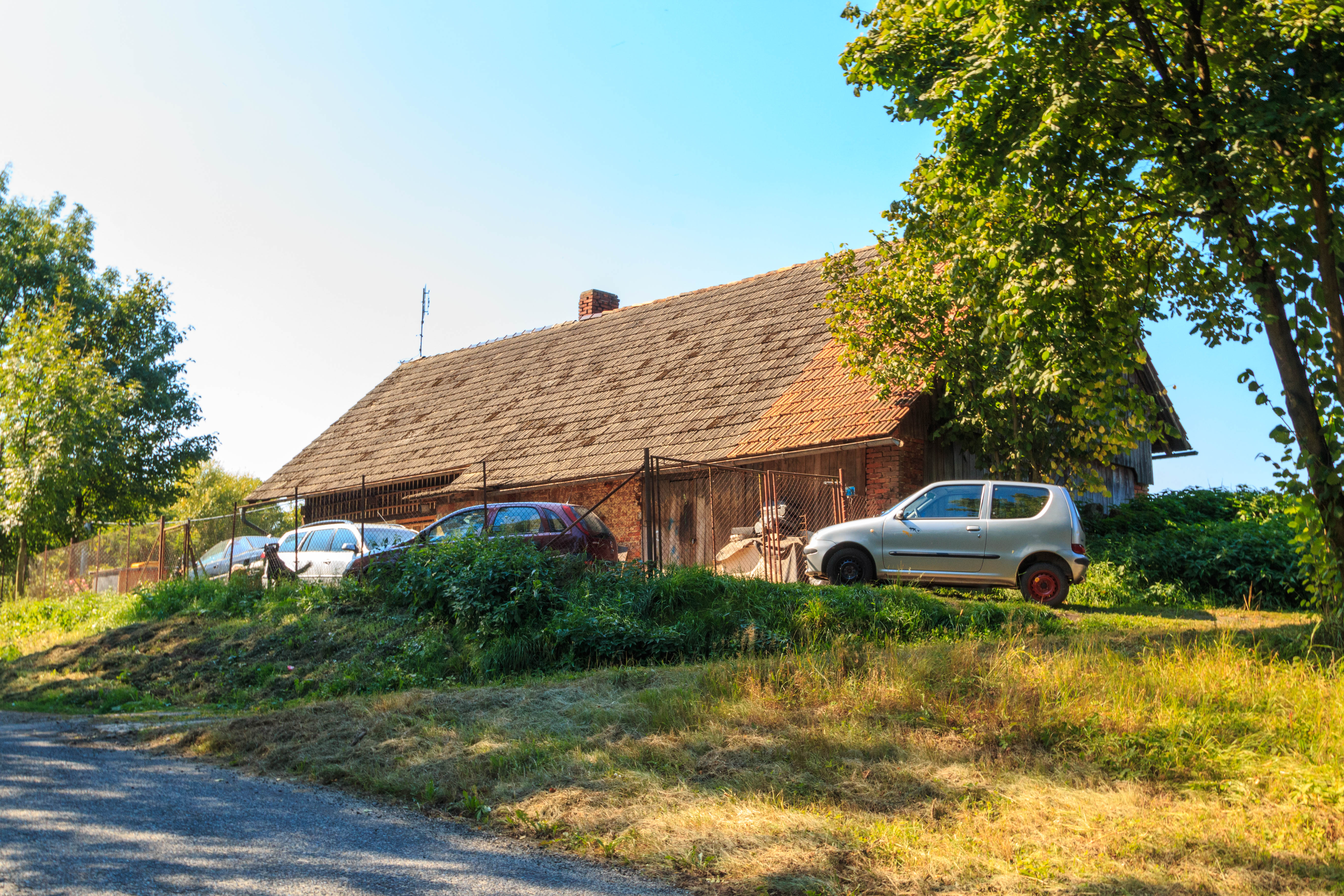 Křečovice 1.díl - čp. 13